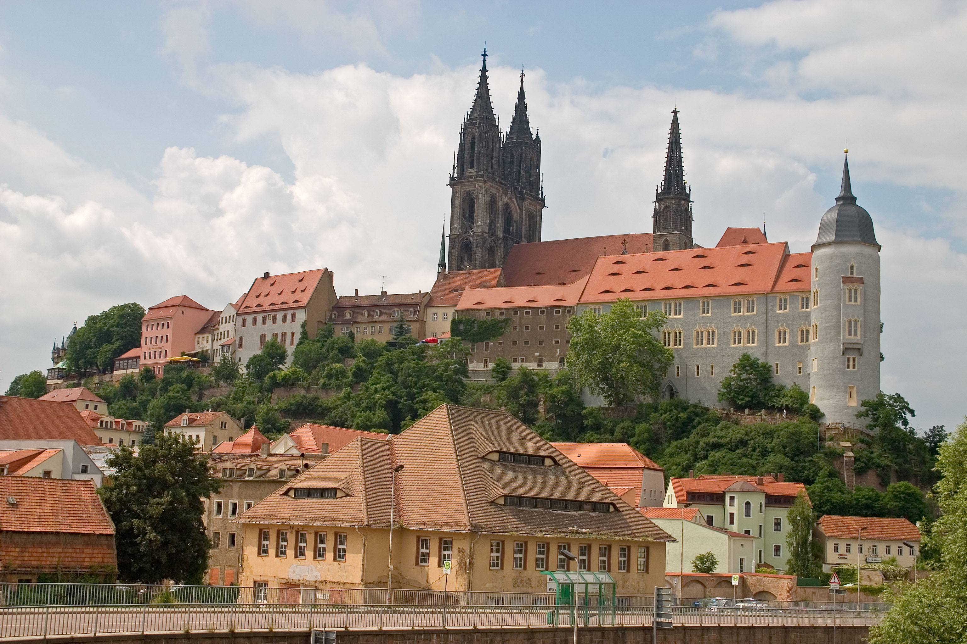 Meißen, Germany Author: Adam Kumiszcza